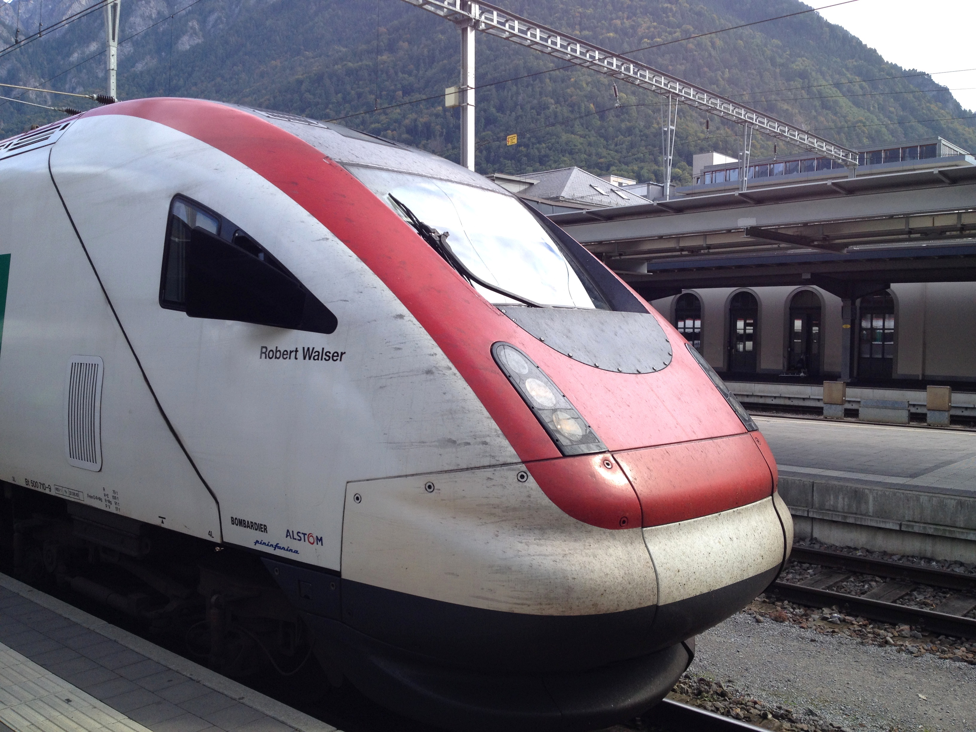 Nach Robert Walser benannter Zug der SBB